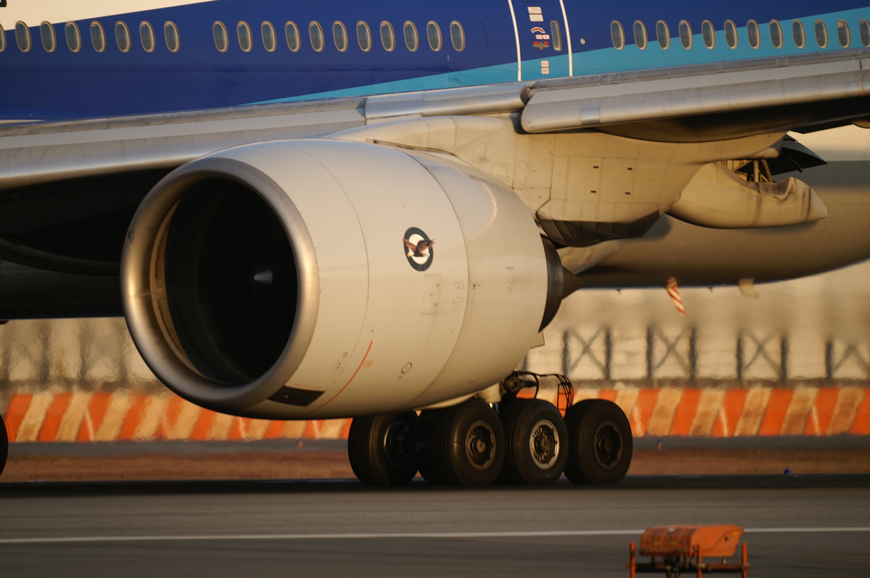 Pratt & Whitney PW4074 sur un Boeing B777